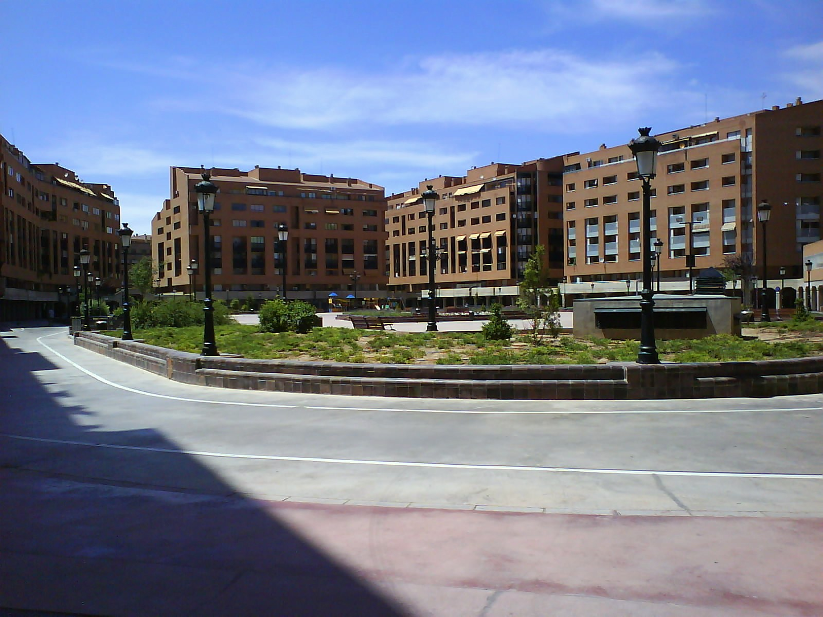 Plaza de La Mancha situada en el barrio de Villacerrada en la ciudad de Albacete.